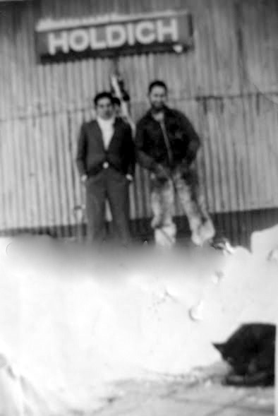 En estación Holdich, con nieve, mediados de 1930.